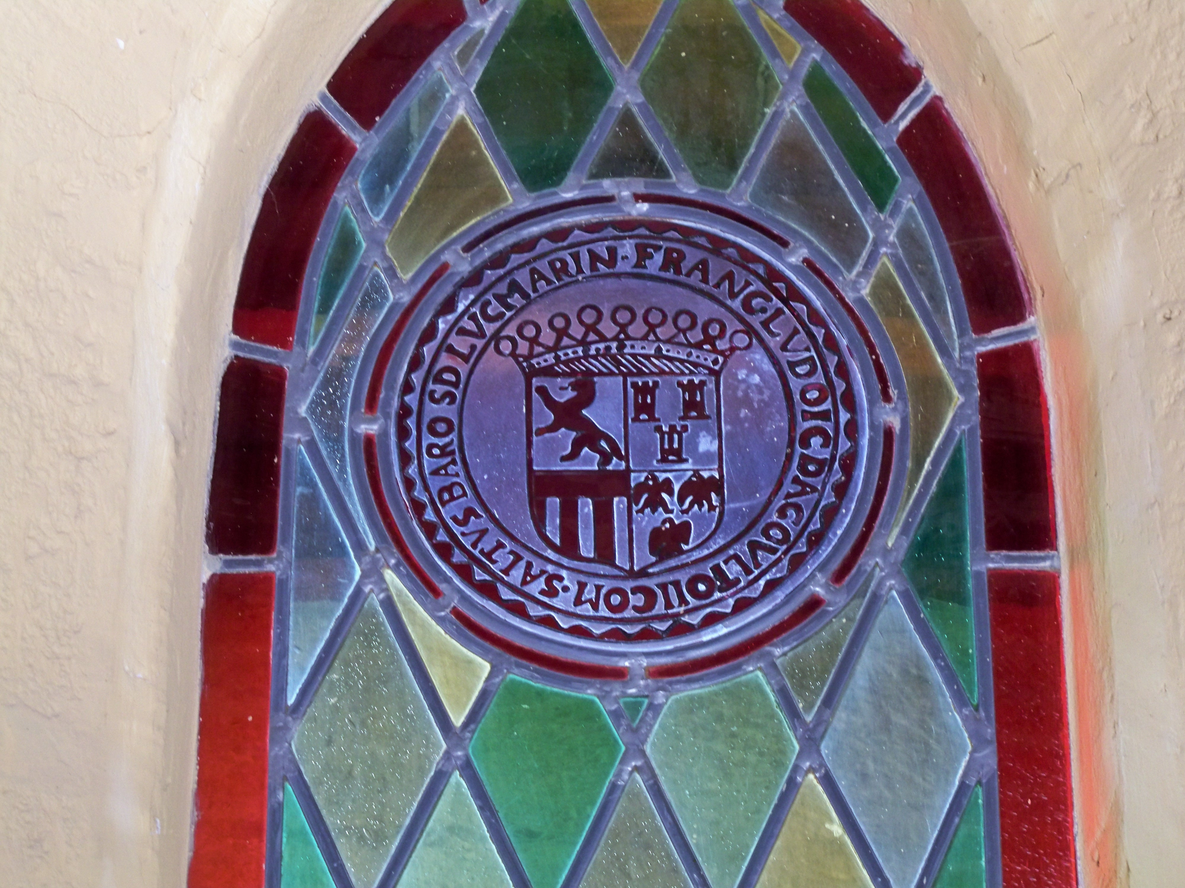 Château de Lourmarin (84)